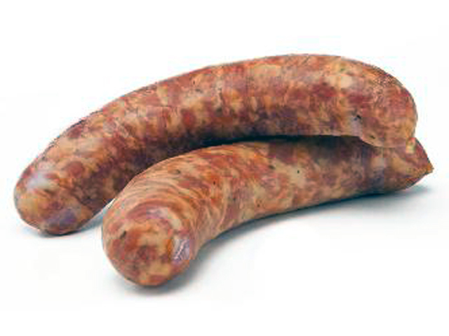 deux saucisses d’Ajoie